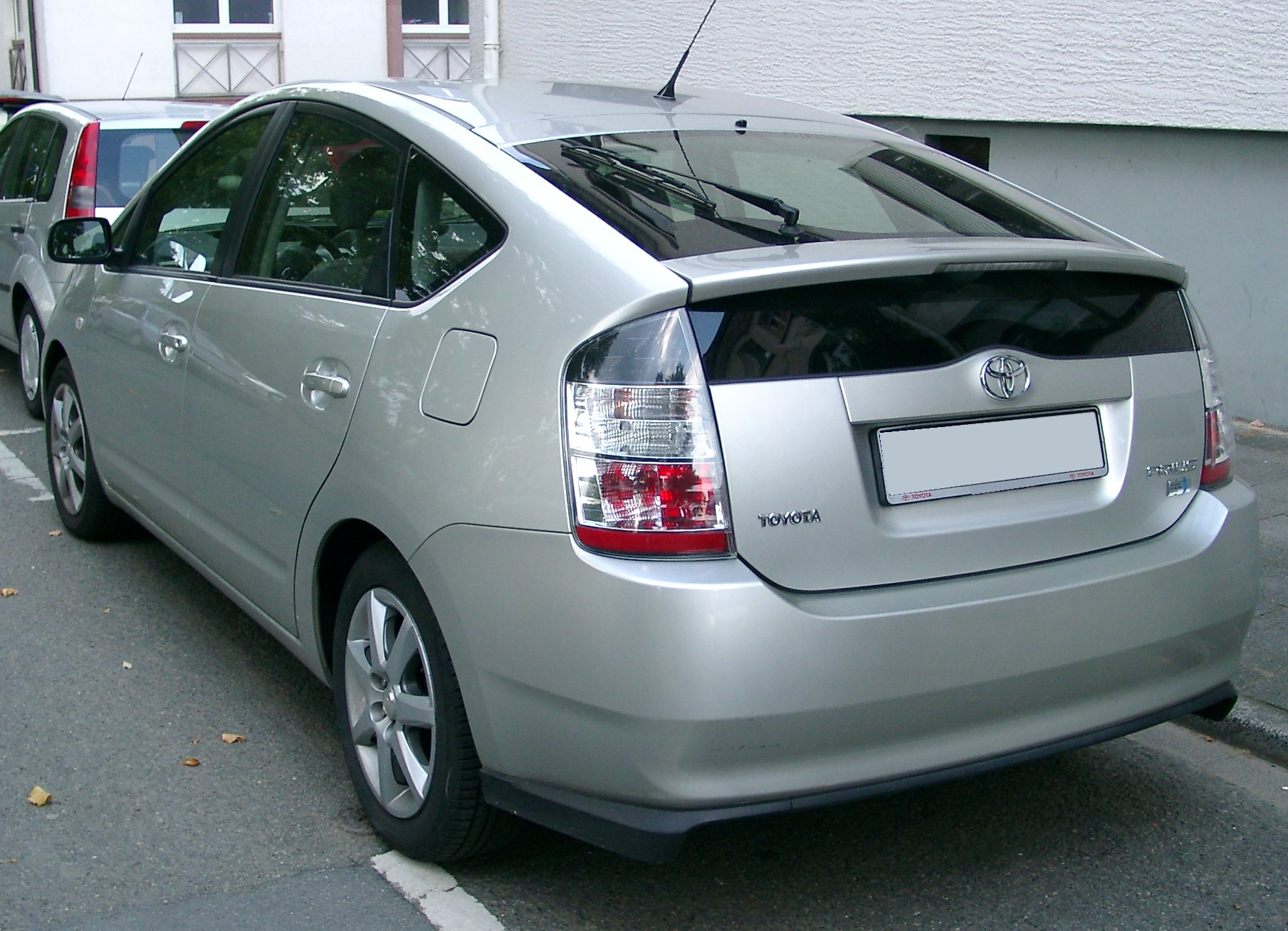 Toyota Prius